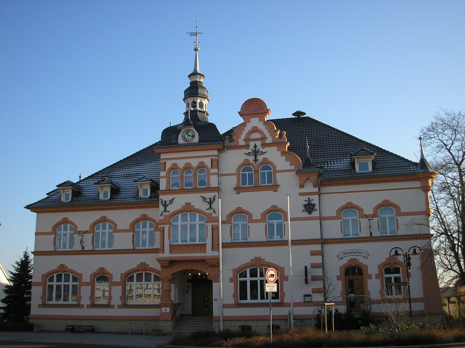 Das Rathaus in Hermsdorf (Thüringen)